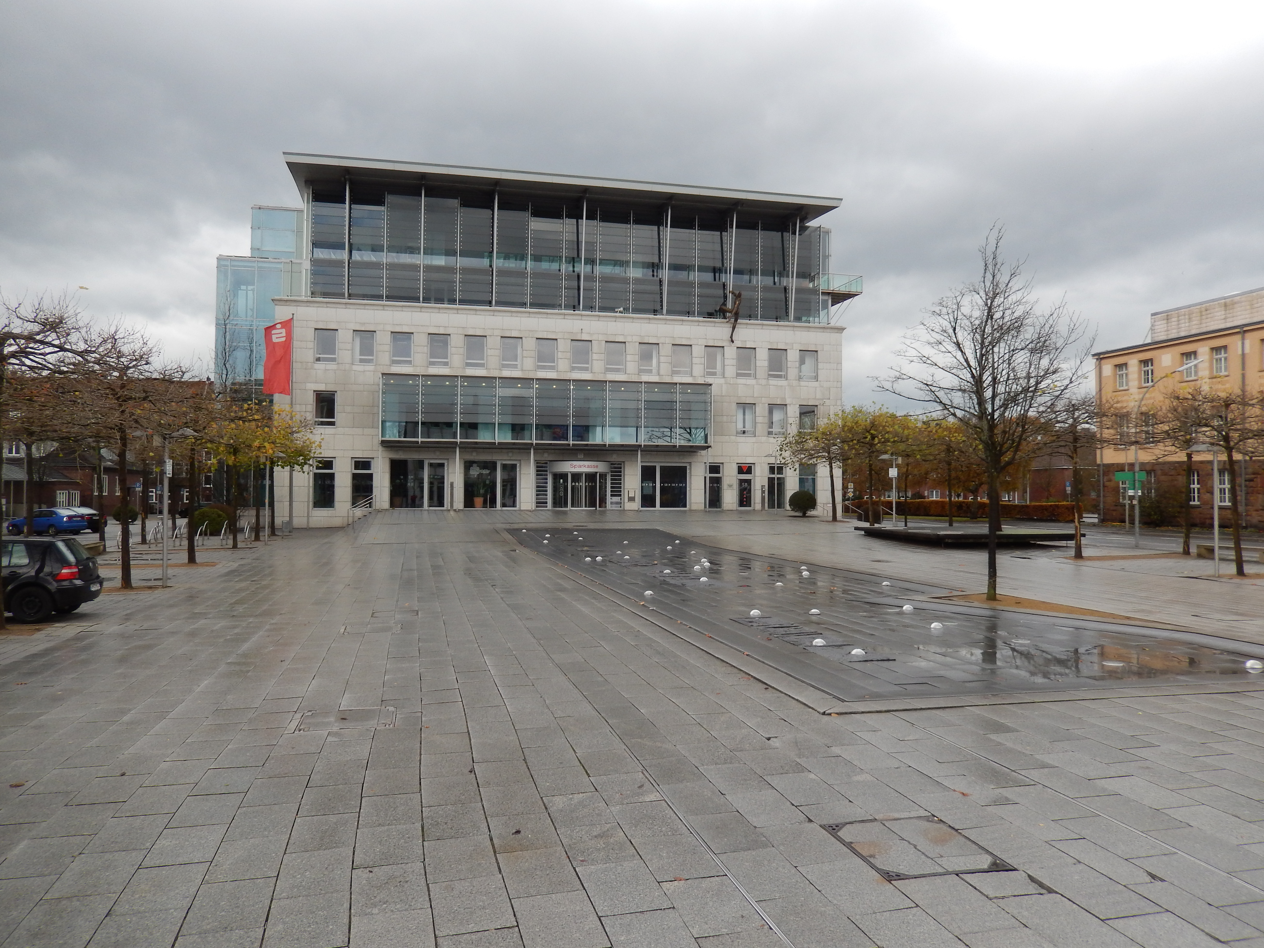 Zentrale der Sparkasse Wilhelmshaven mit Brunnen am Theaterplatz